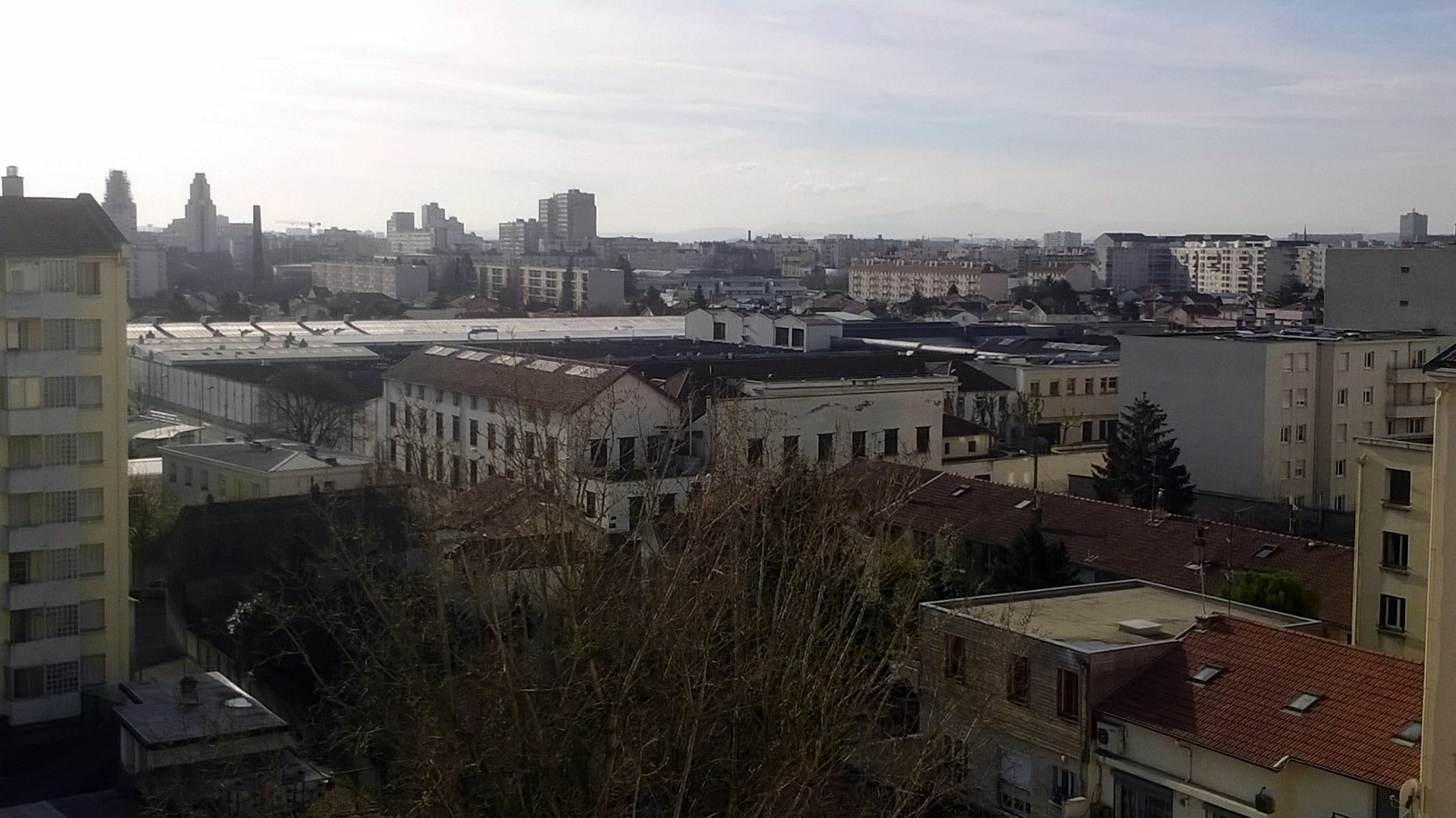 Vue sur l'entreprise Auto Châssis International à Villeurbanne, ancienne filature et ancien arsenal.